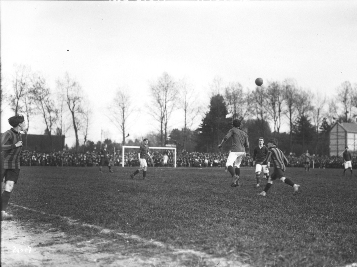 Rouen, finale du championnat de France USFSA, FC Rouen contre SH Marseille sur le terrain du Grand Trianon.